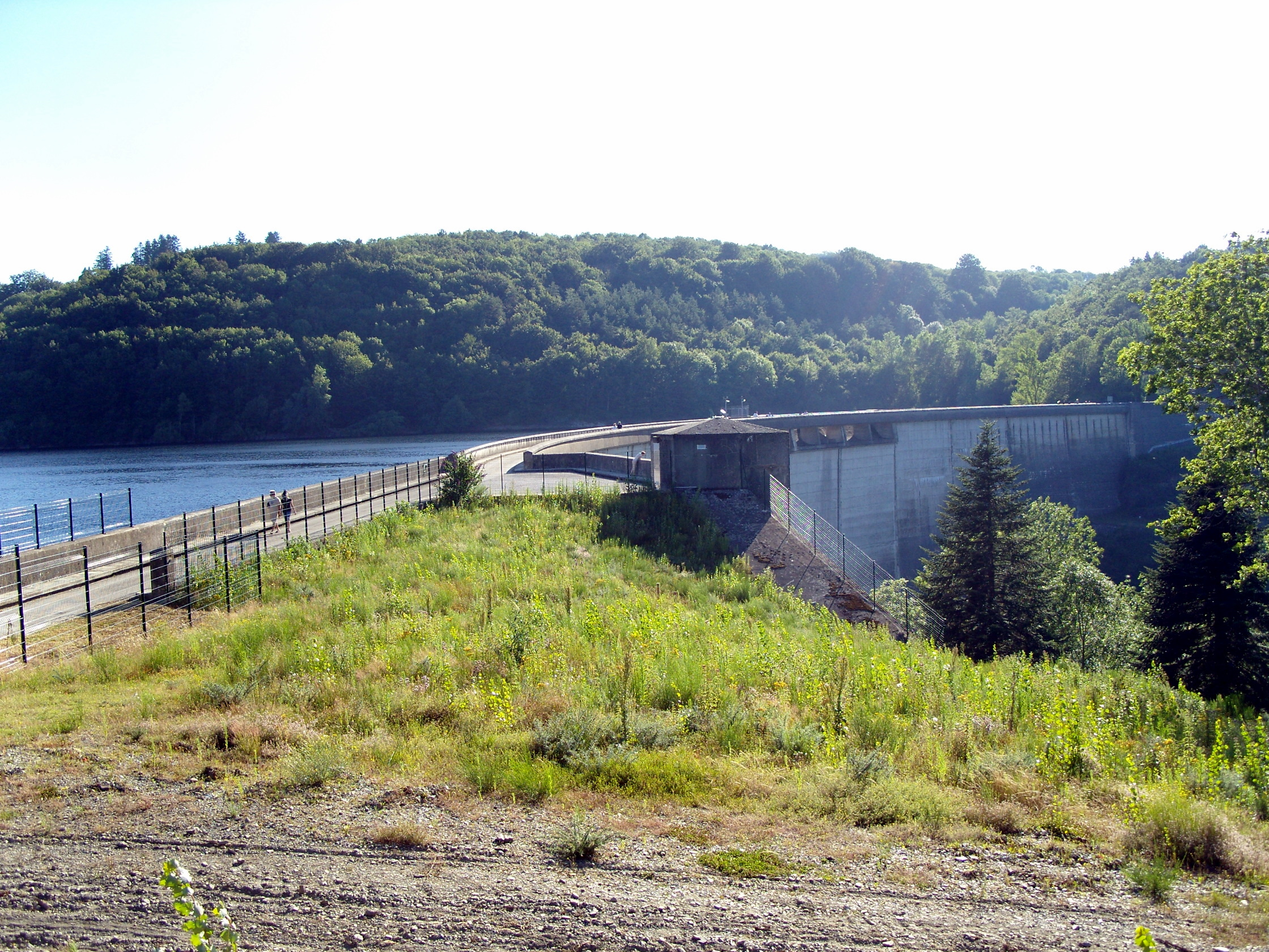 Barrage des Cammazes dans le département du Tarn (81), France